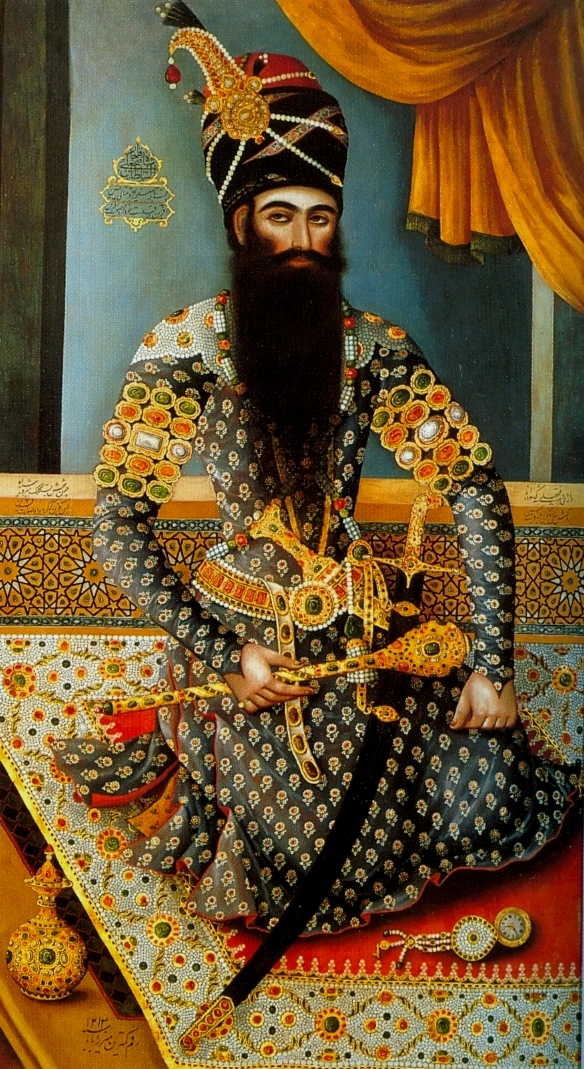 Михр_Али._Фатх_али_Шах_1798